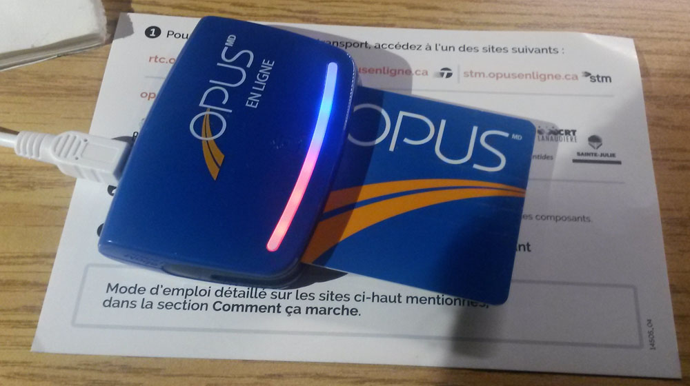 Lecteur pour carte à puce «Opus» pour titres de transport au Québec.